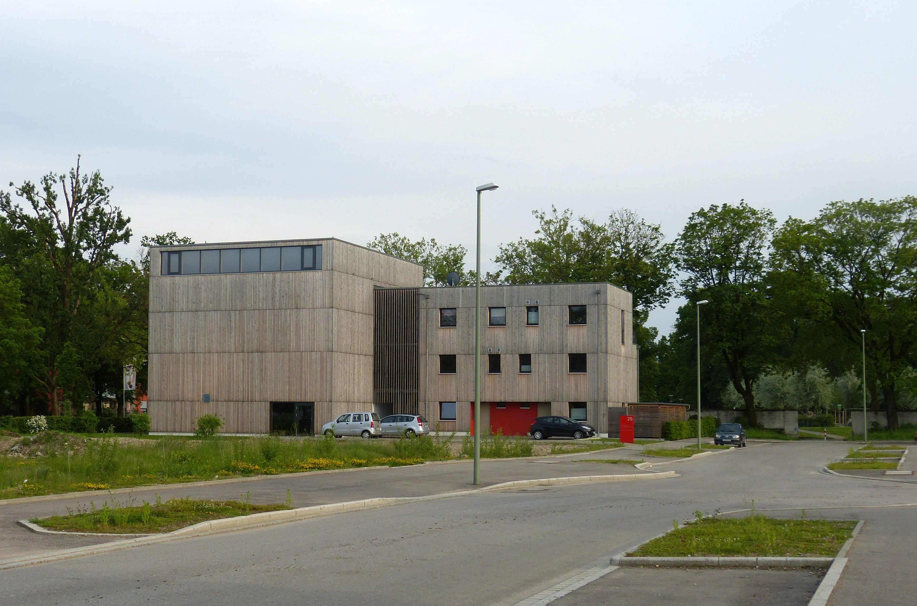 Die altkatholische Apostelin-Junia-Kirche in Augsburg.